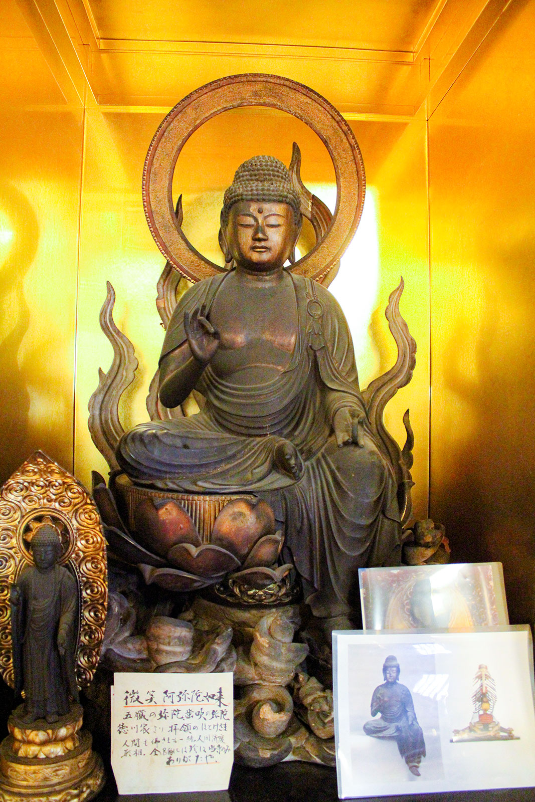 体内に骨や五臓を再現した阿弥陀如来像